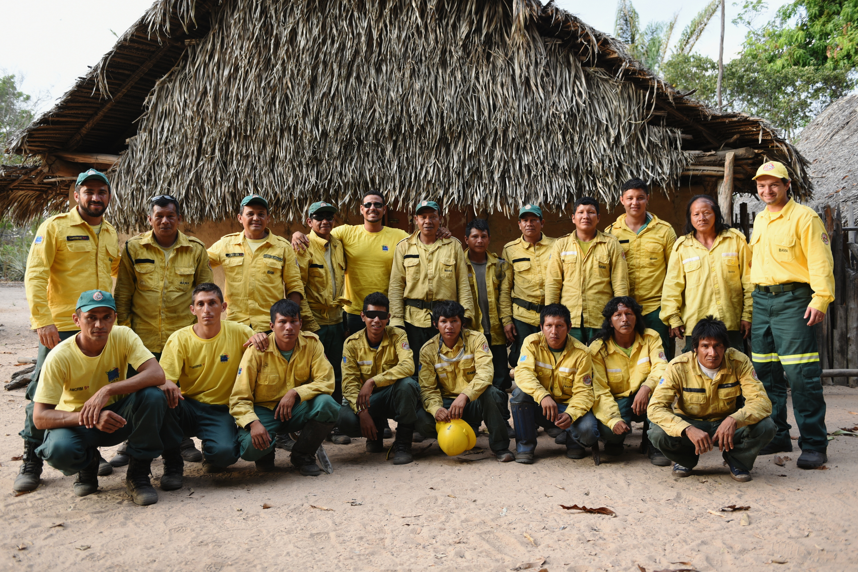 Brigadas indígenas do Prevfogo/Ibama combatem incêndio florestal na Terra Indígena Porquinhos, no Maranhão Foto: Felipe Werneck/Ibama